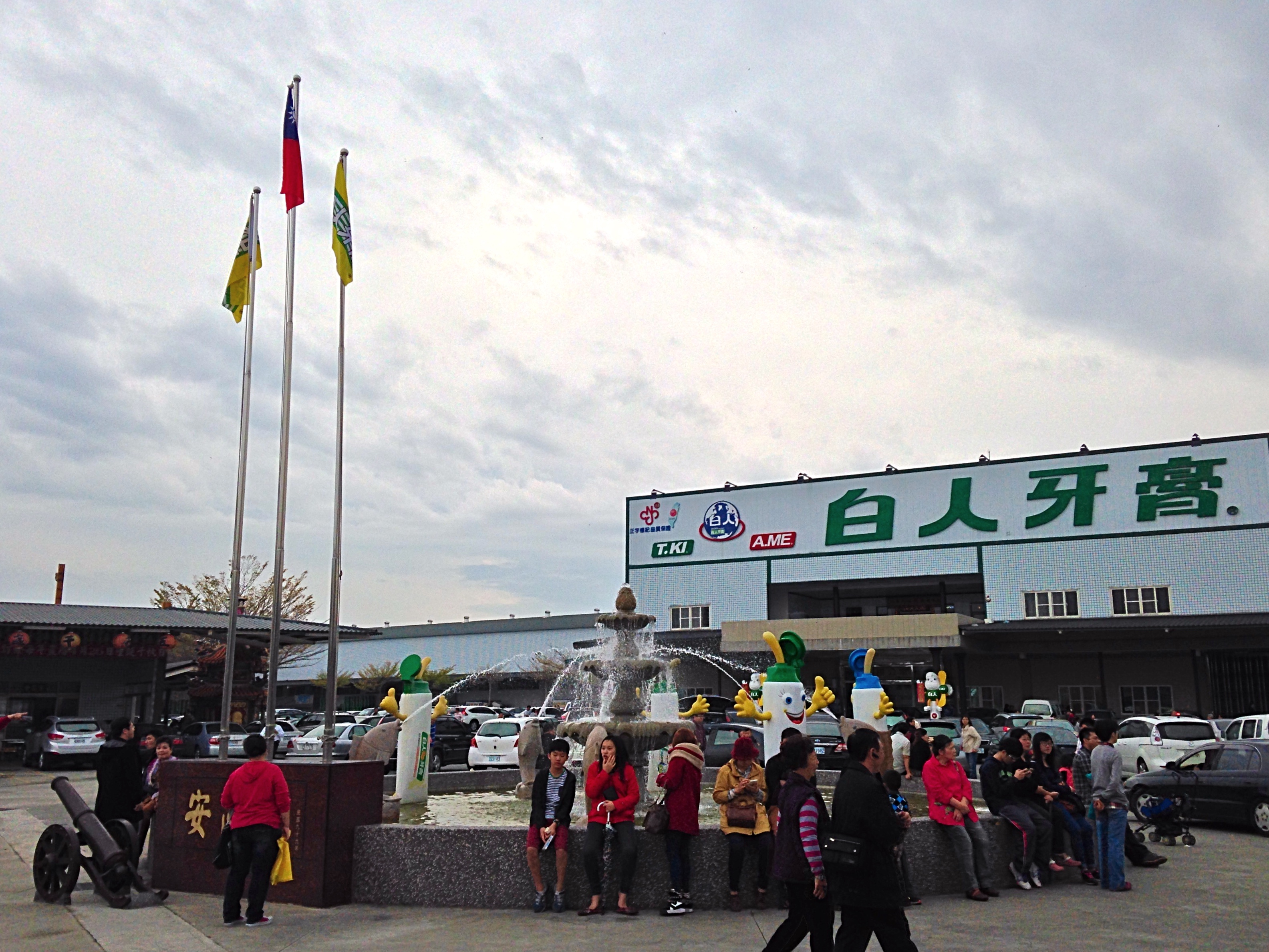 中文（台灣）: 嘉聯實業白人牙膏觀光工廠，位於嘉義縣水上鄉龍德村十一指厝144號。前方水池為安心池。